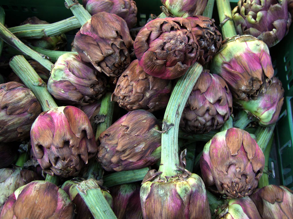 Artischocken